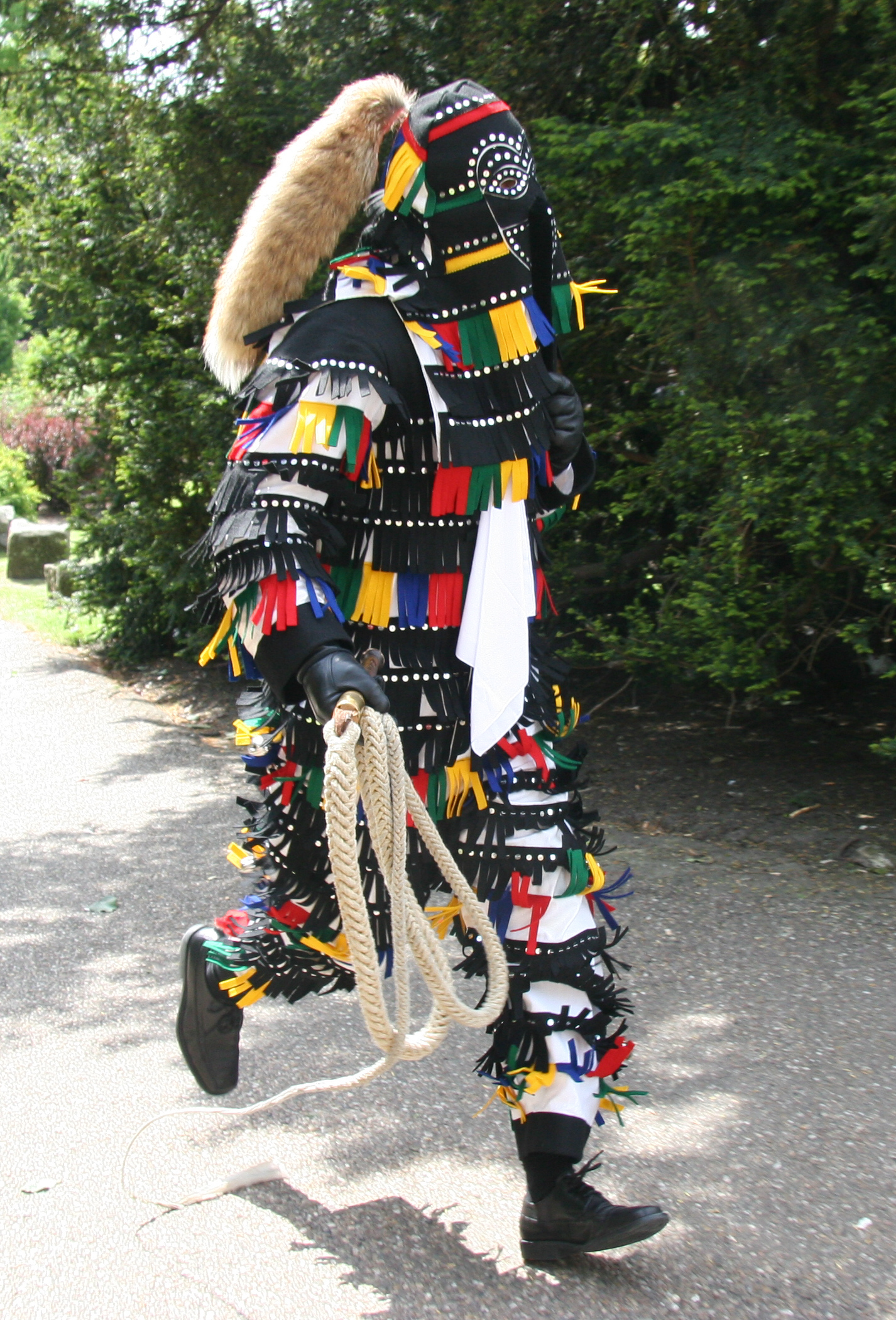 Sword spectacular, York 2008, Hänsele der Narrenzunft Überlingen (in Begleitung der Überlinger Schwertanzkompanie)